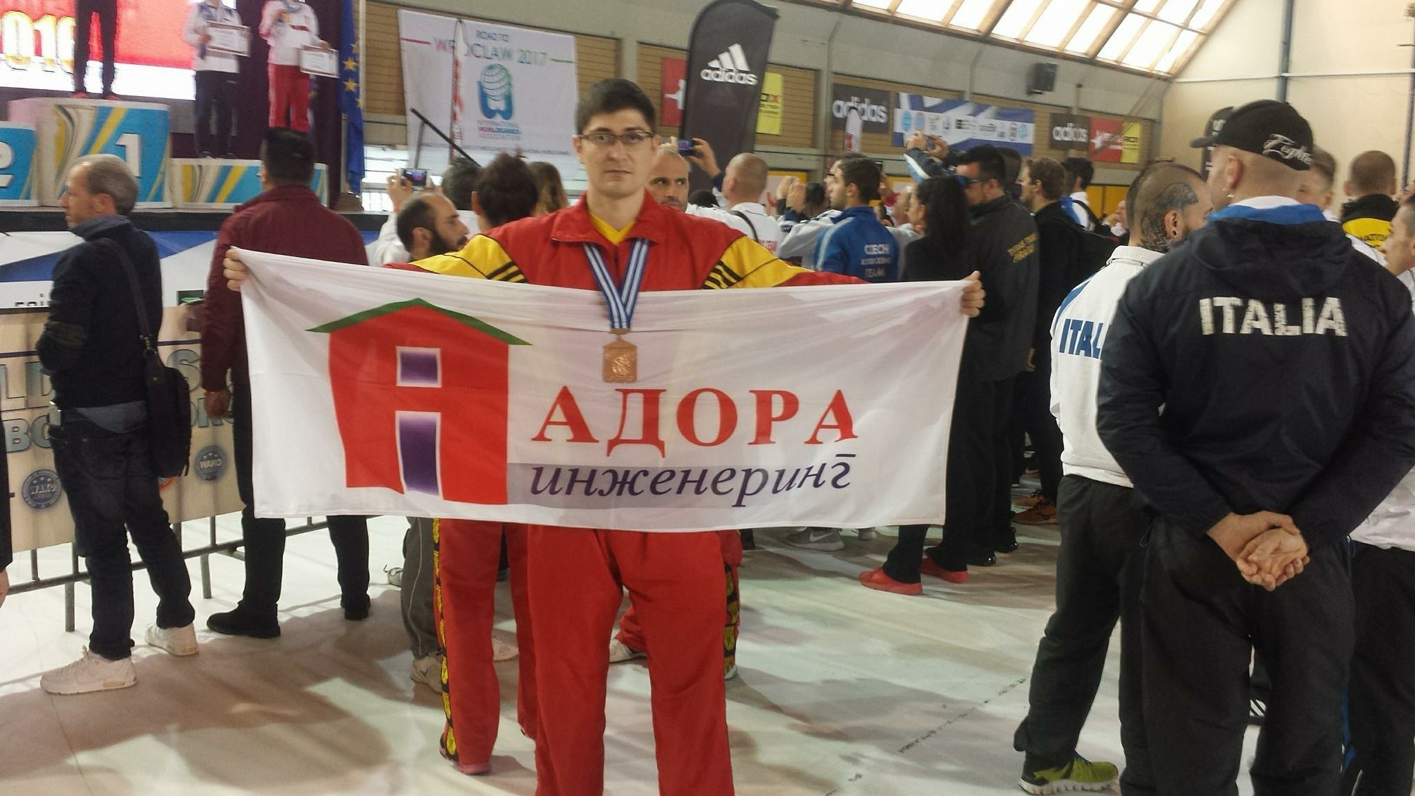 Dimitar Gorgiev Shampion vo kik boks